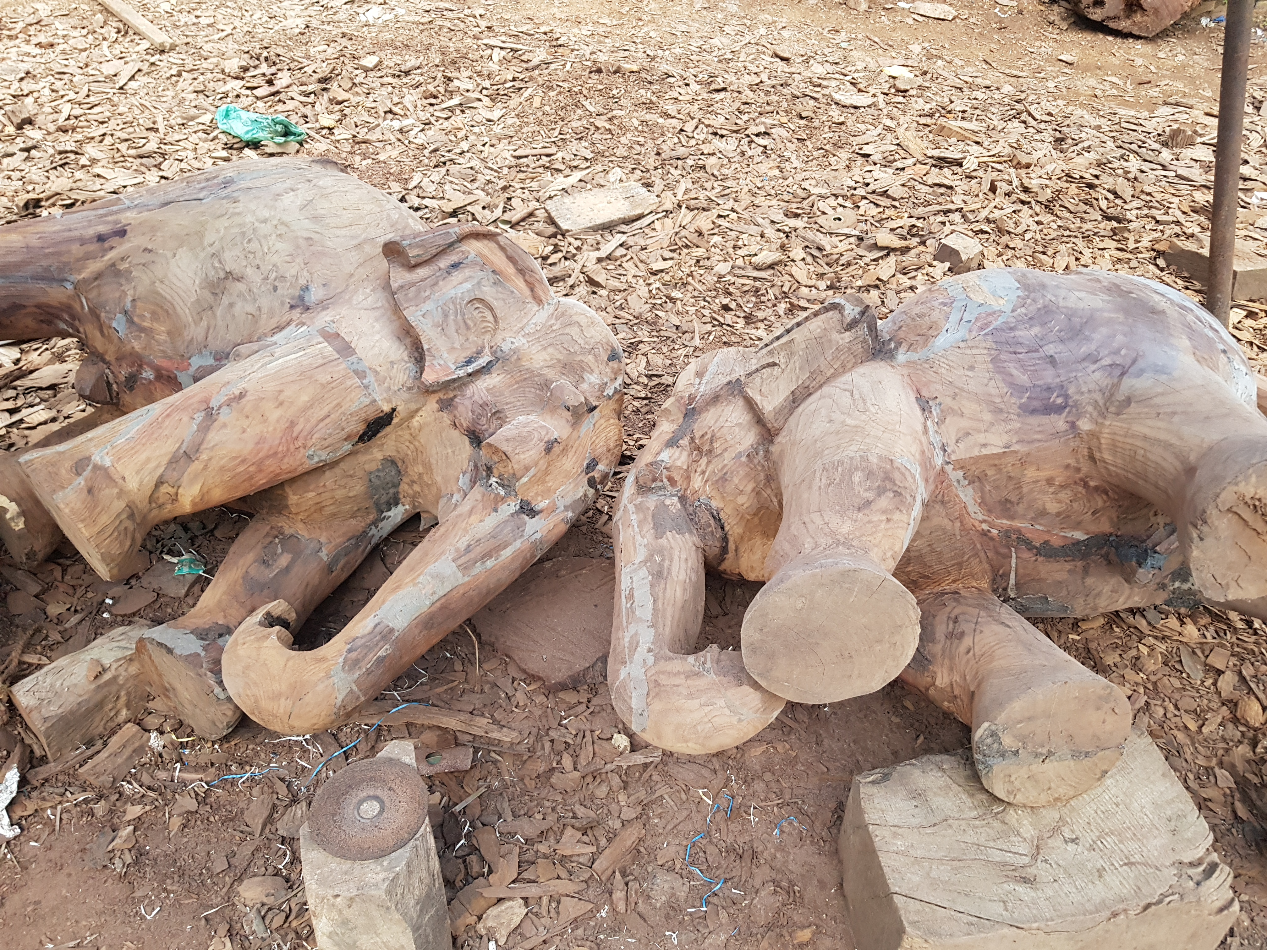 ആര്യനാട് കലാ ഗ്രാമം